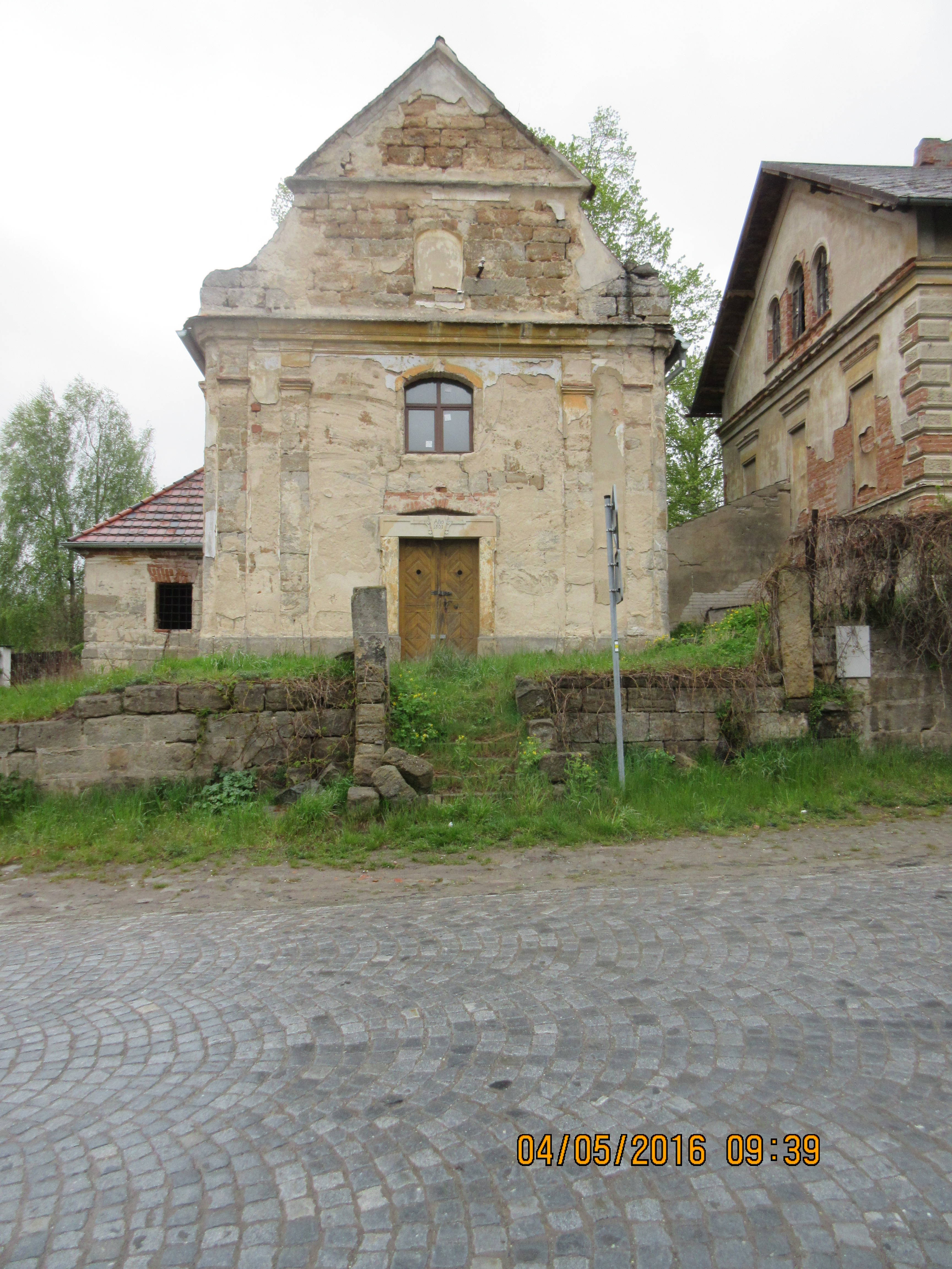 Kaple ve středu obce Vrchovany na Českolipsku